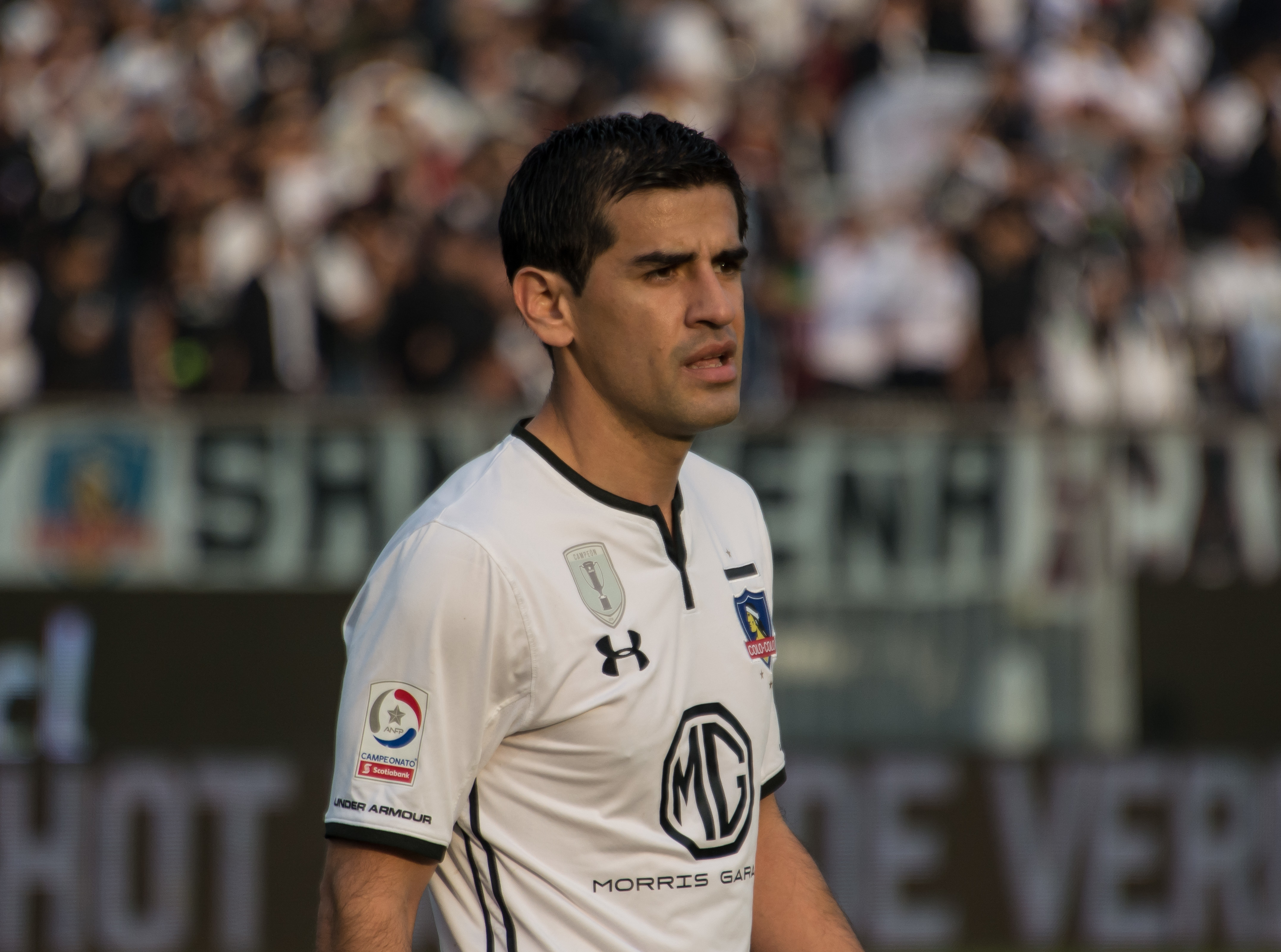 Julio Barroso, Colo-Colo v San Luis, Estadio Monumental, Macul, Santiago, Chile.